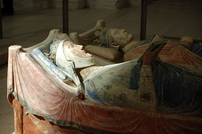 Les gisants d'Aliénor d'Aquitaine et Henri II à Fontevraud